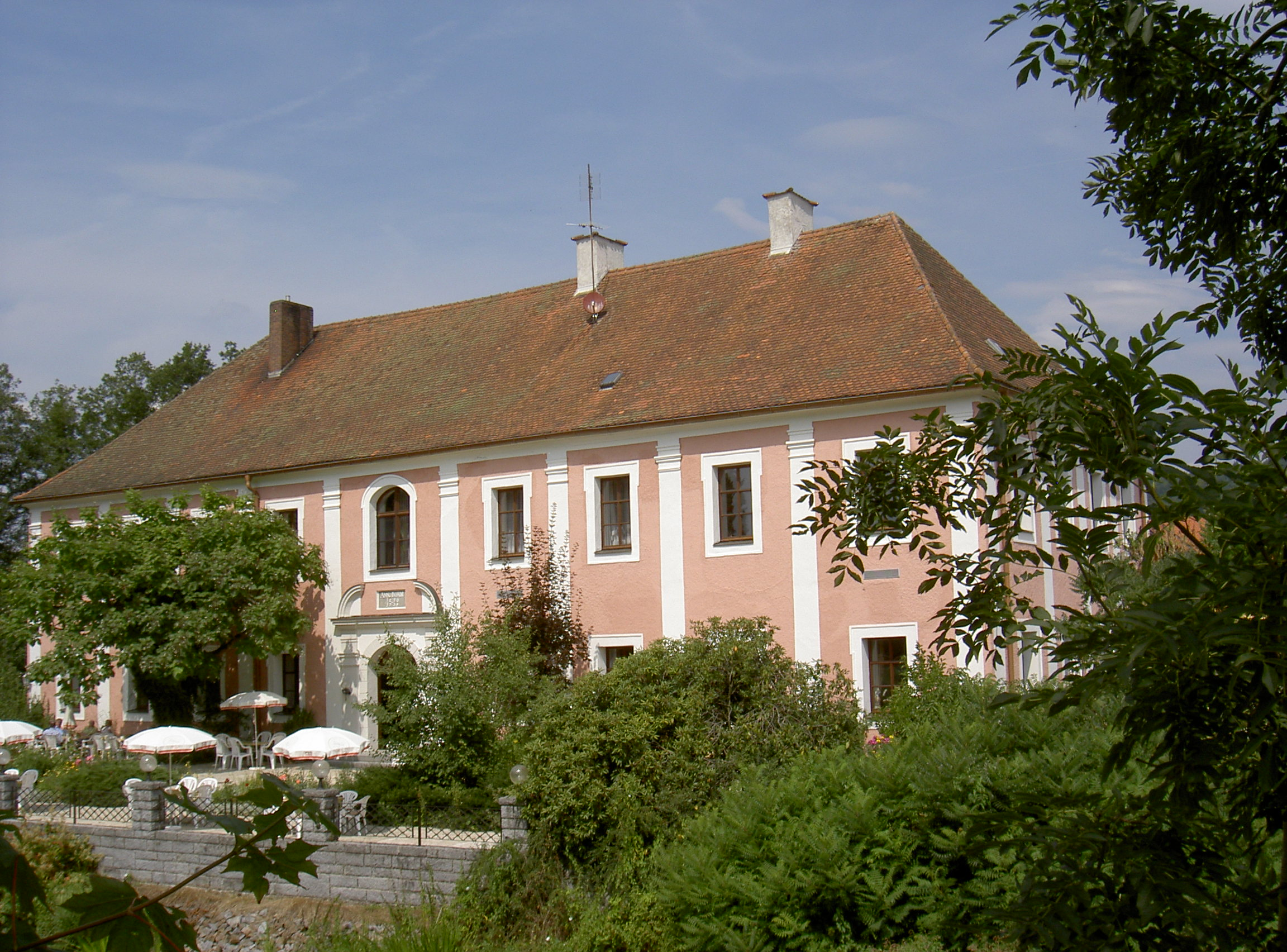 Kröblitz, ehemaliges Barockschloss, jetzt Brauerei und Gastwirtschaft